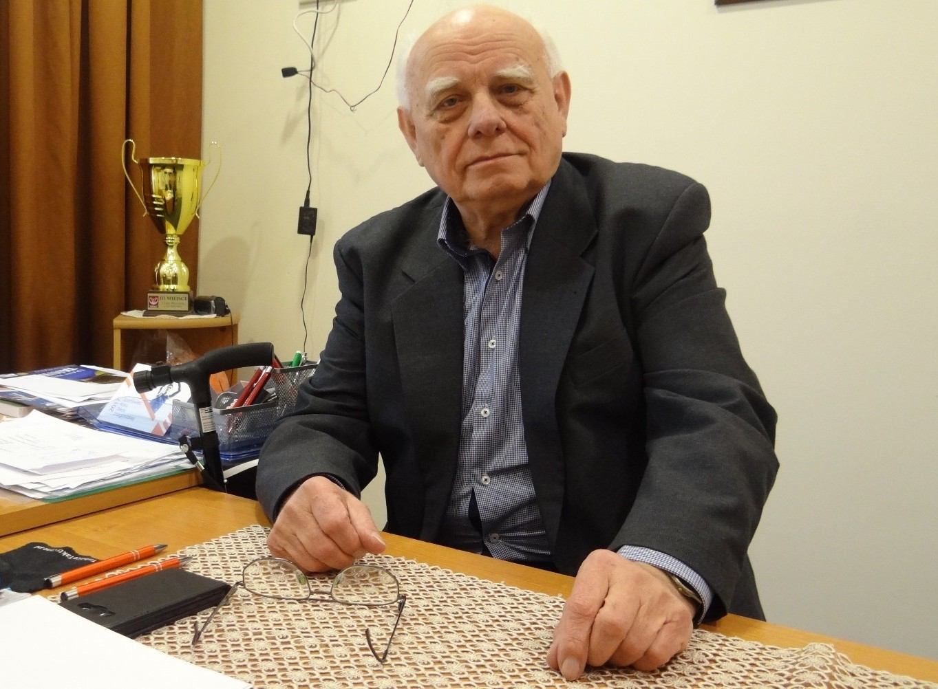 Tadeusz Sikora